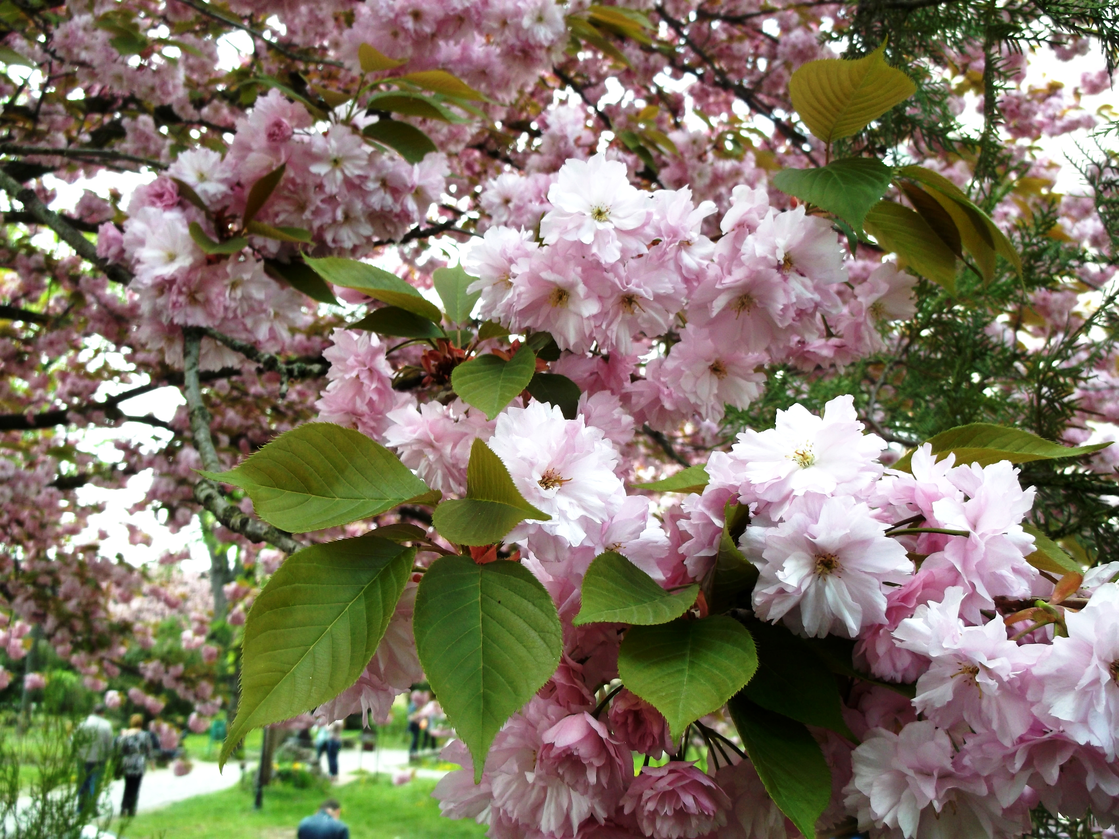 Сакура в Ужгороді